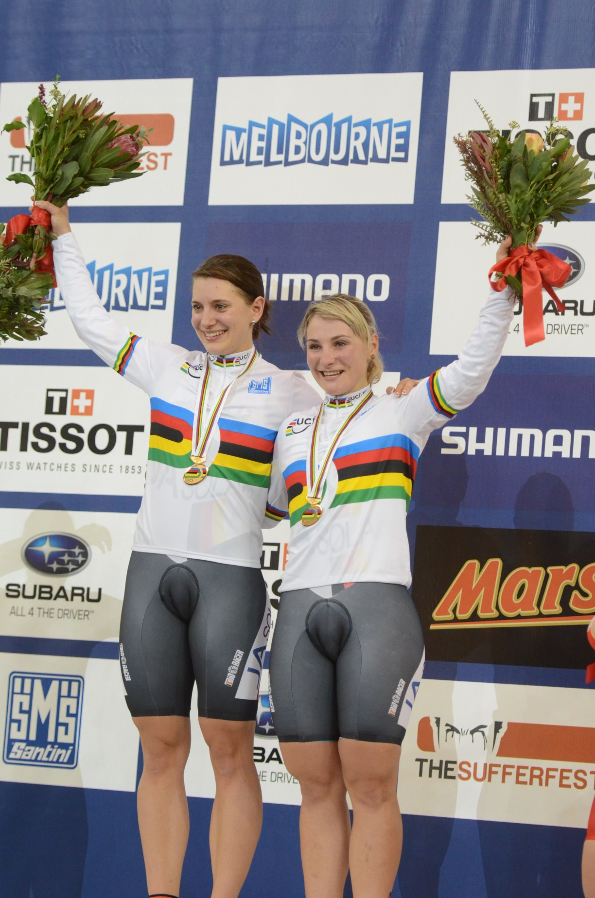 Miriam Welte (l.), Kristina Vogel, Weltmeisterinnen im Teamsprint Melbourne 2012